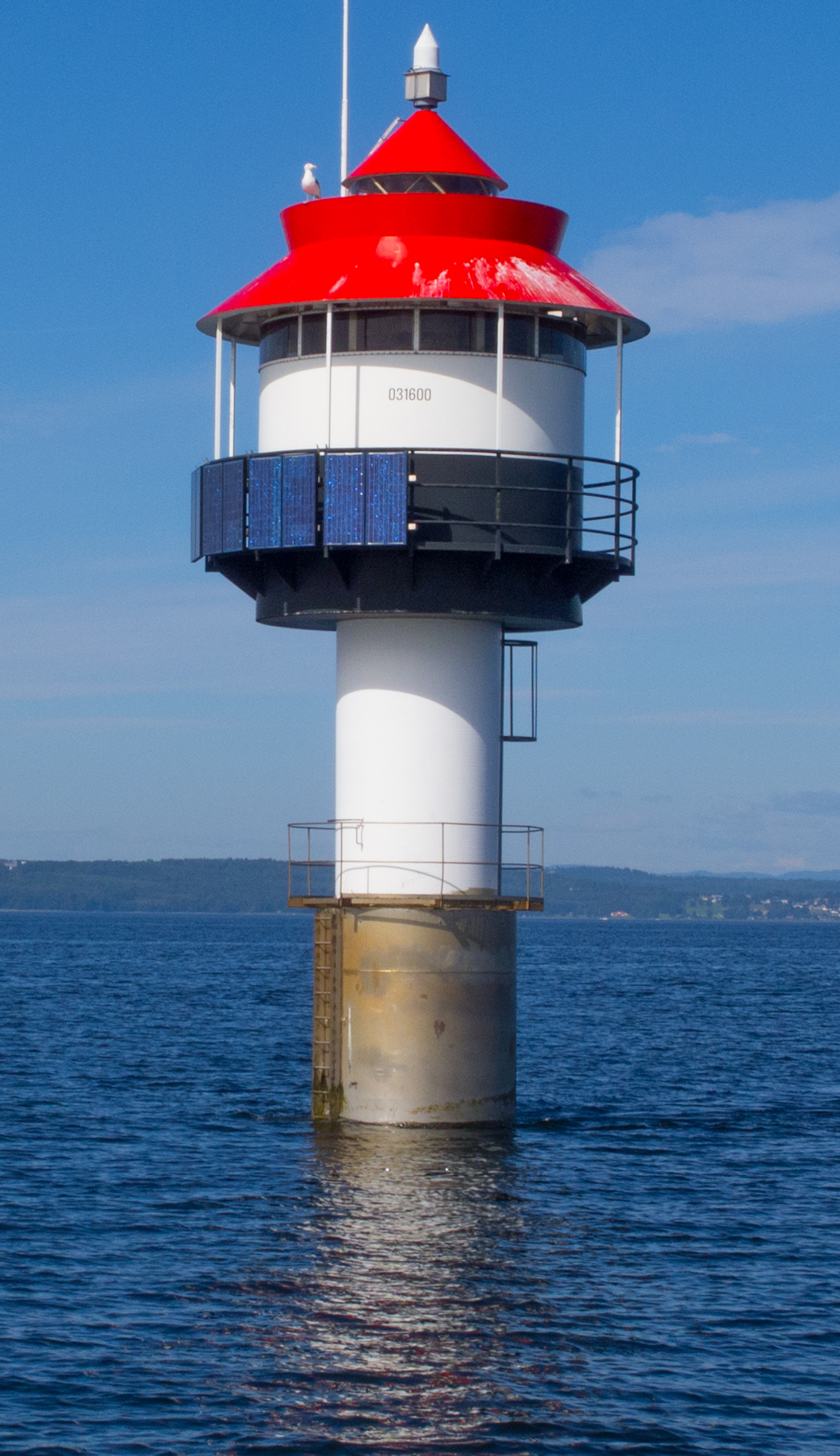 Mefjordbåen light